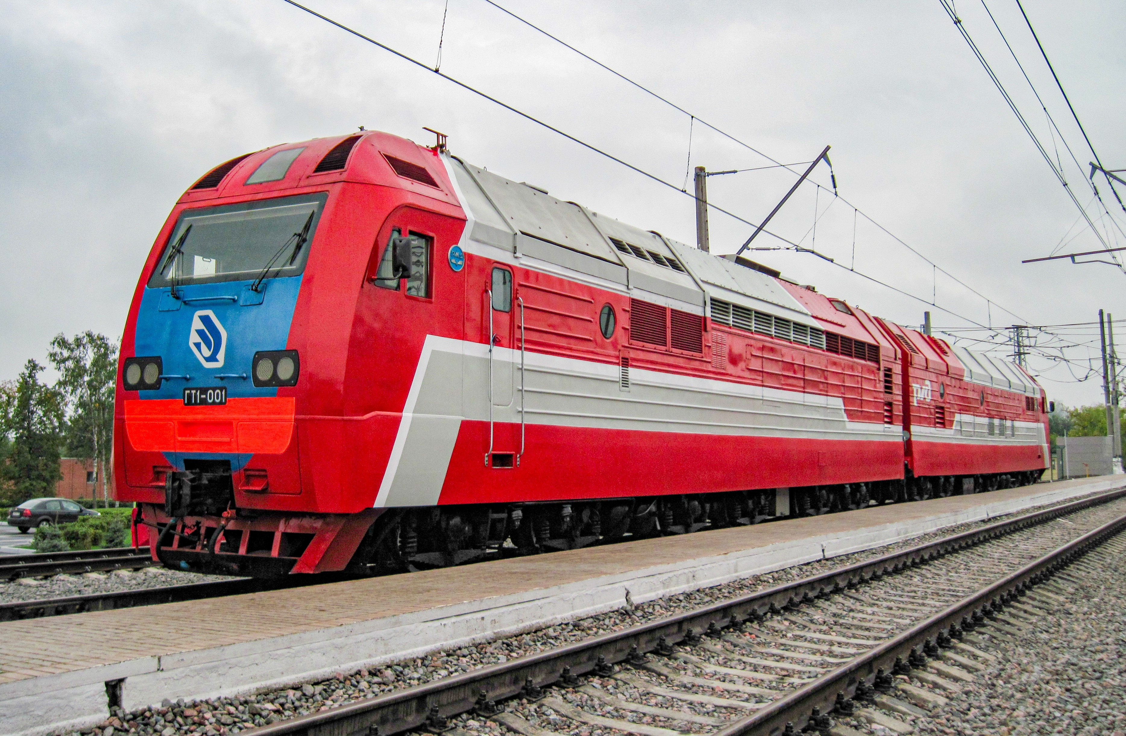 Внешний вид газотурбовоза ГТ1